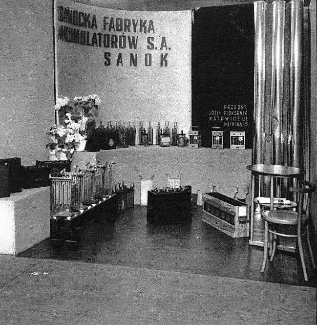 Sanocka Fabryka Akumulatorów (Wystawa Elektromechaniczna w Katowicach 1939)